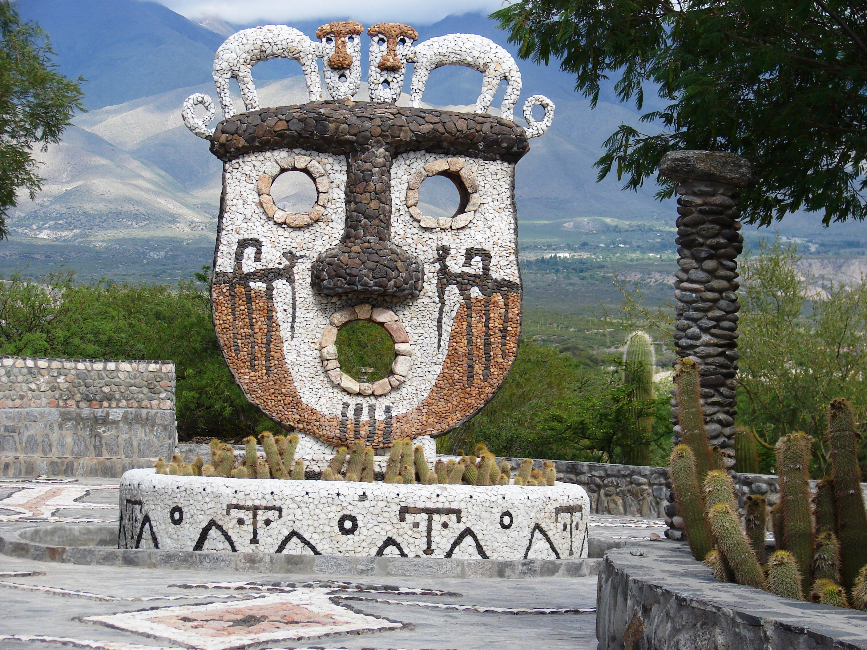 Homenaje a la Madre Tierra